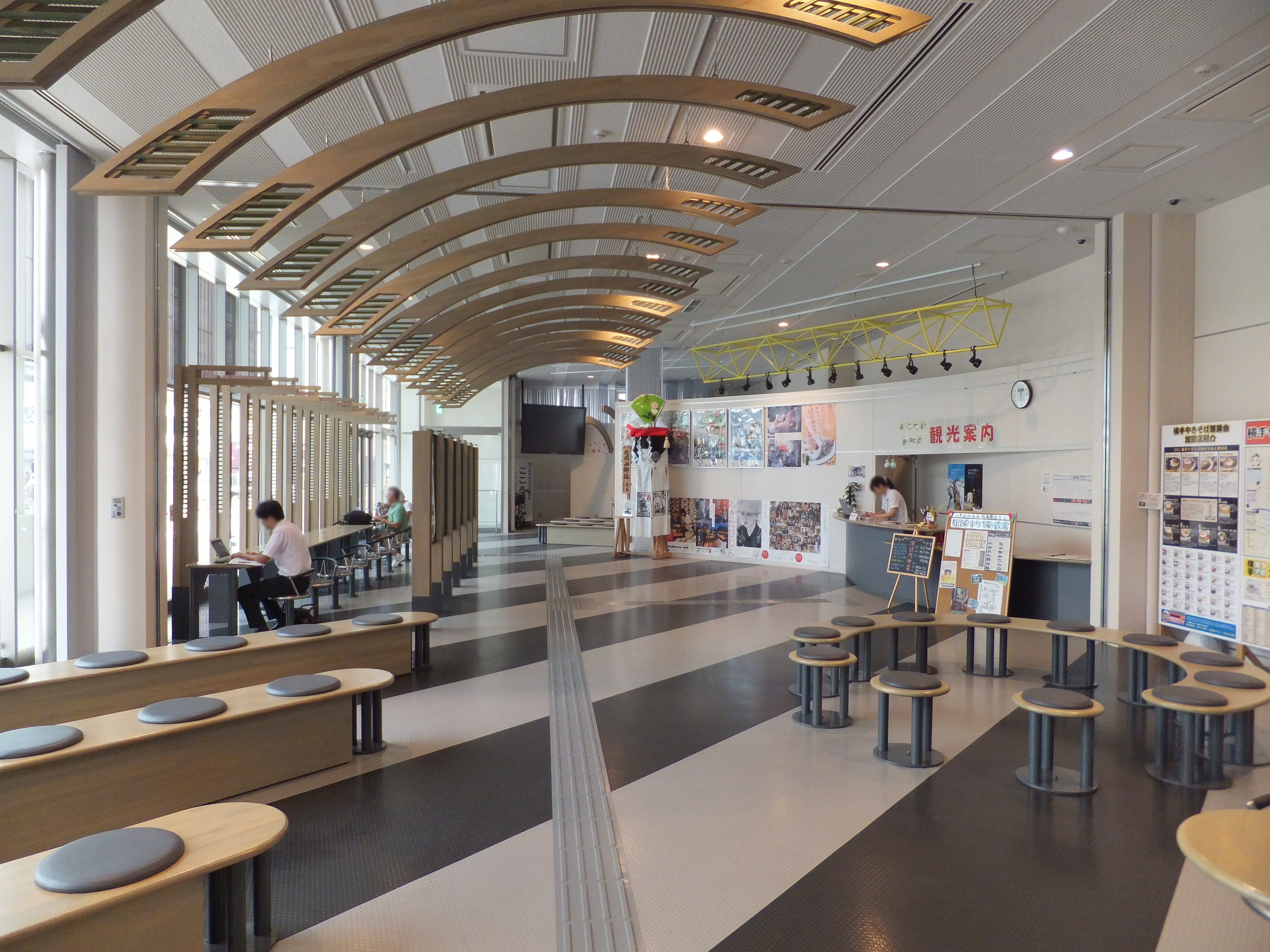 横手駅観光案内所